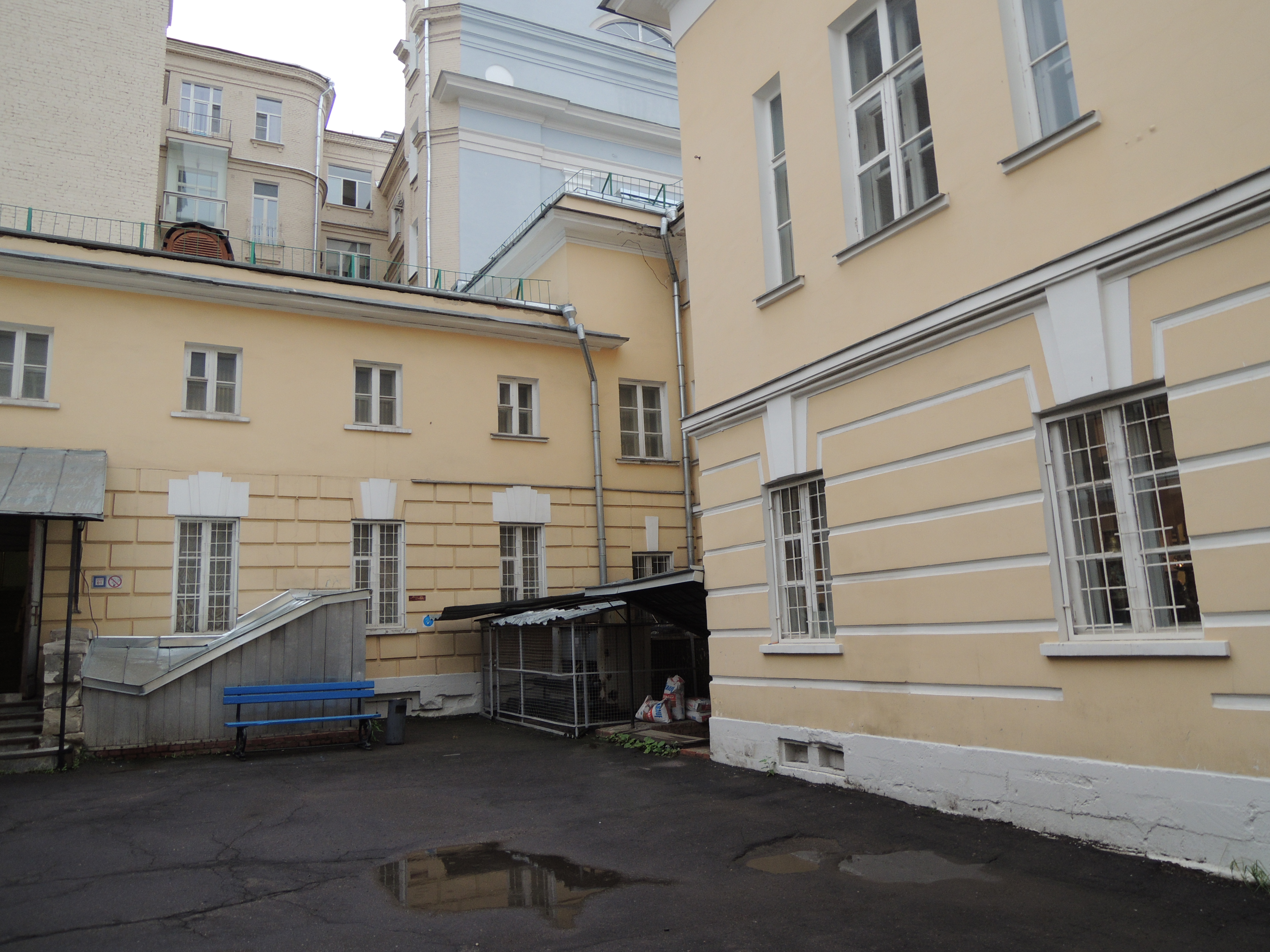 Государственный музей Востока (Москва)